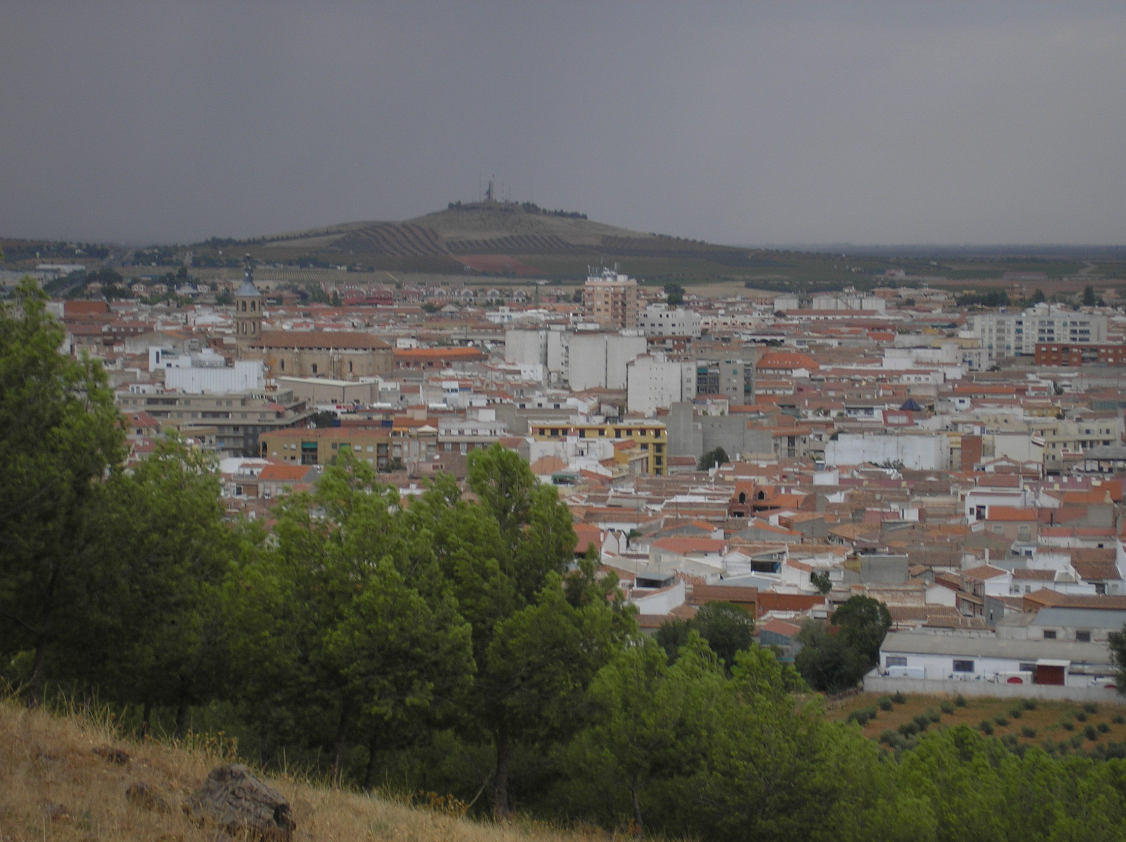 taken by Valdoria